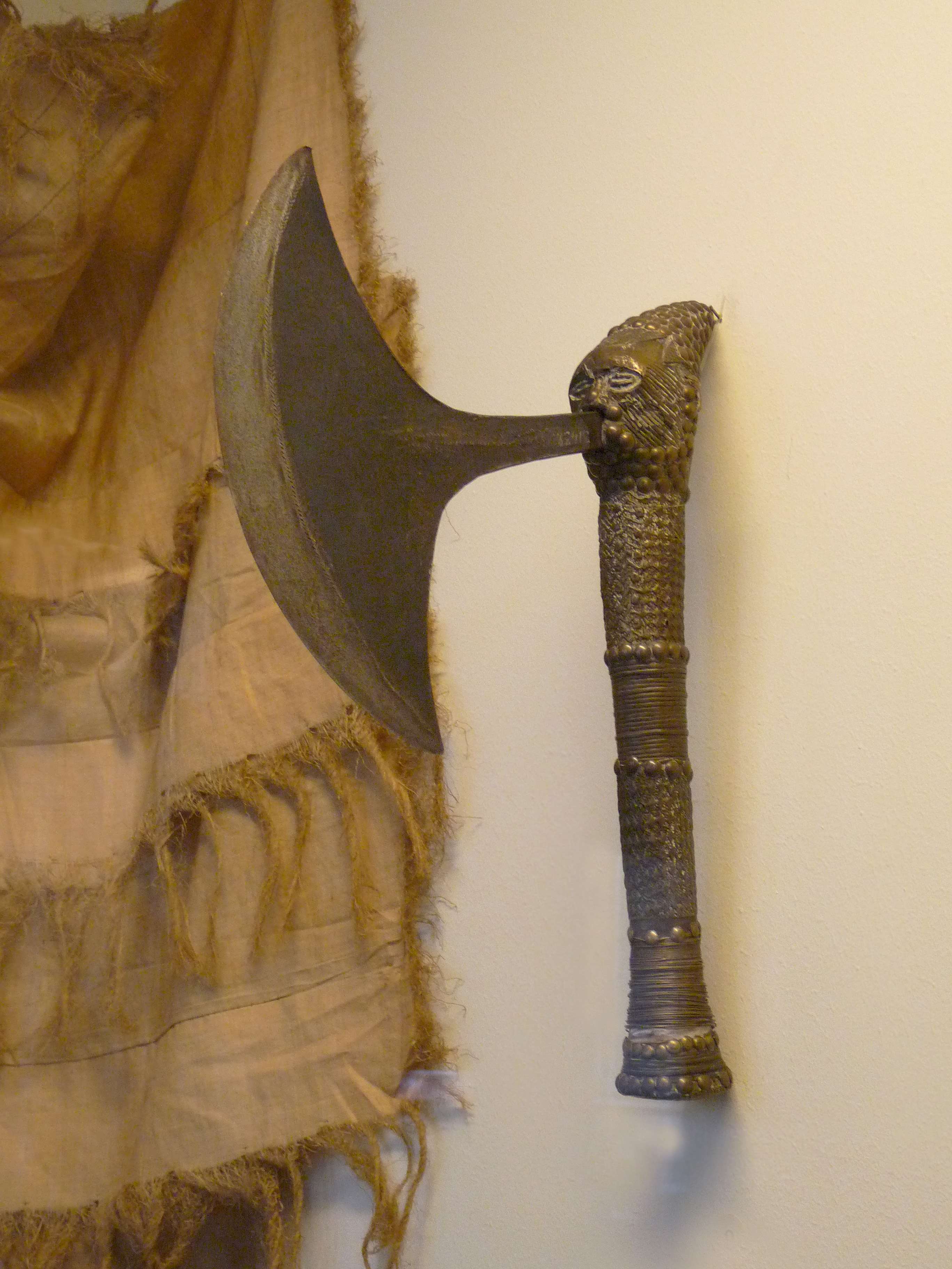 Teke (Zaïre) : hache de prestige. Musée royal de l'Afrique centralel